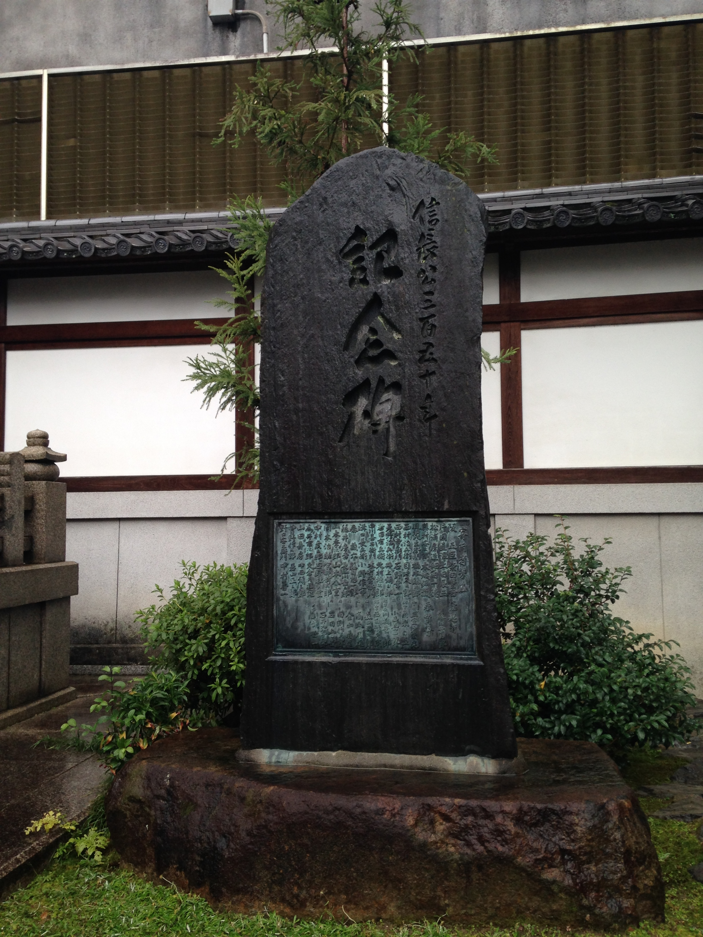 本能寺・信長公350年記念碑